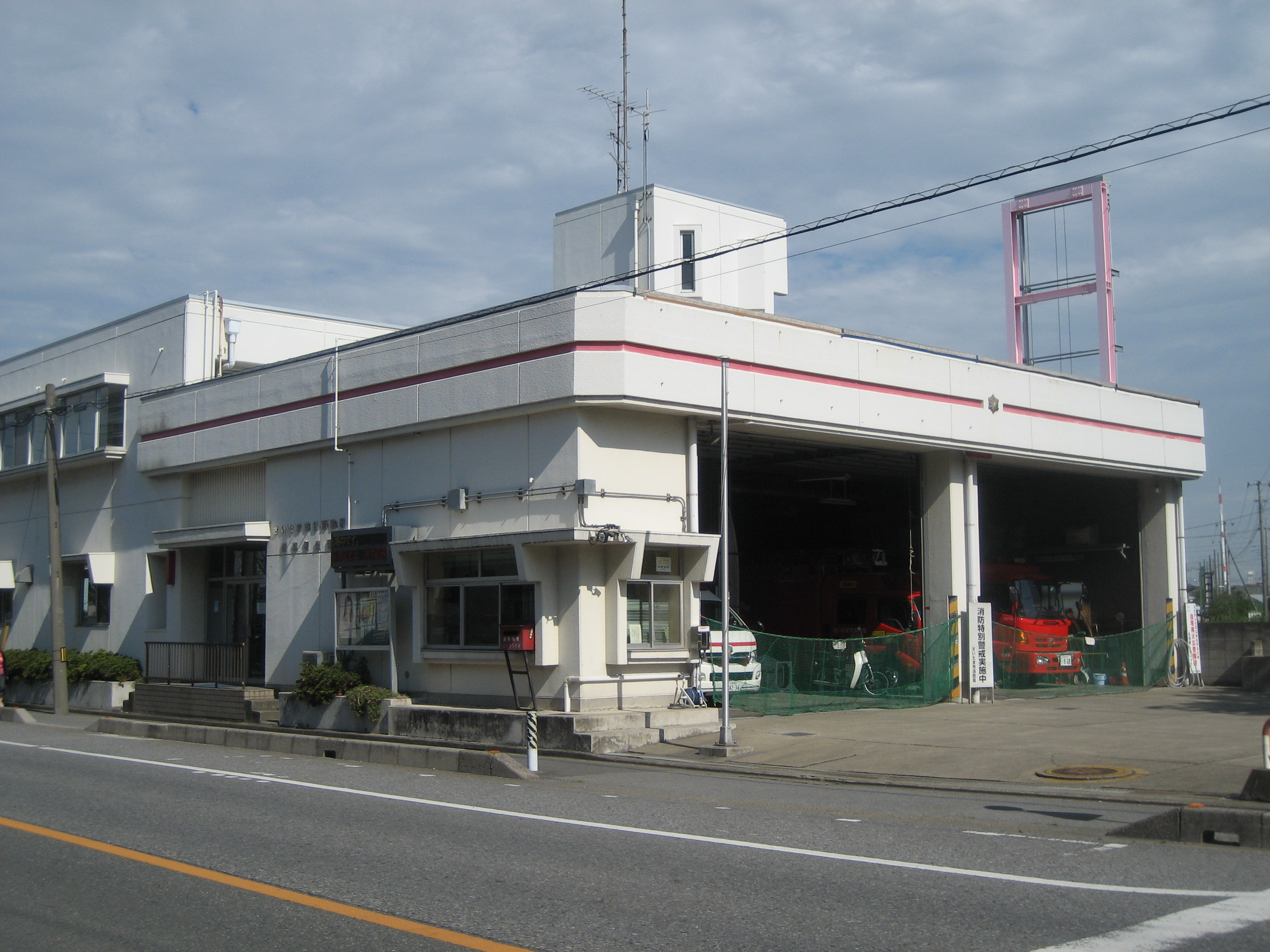 さいたま市消防局桜消防署西浦和出張所庁舎